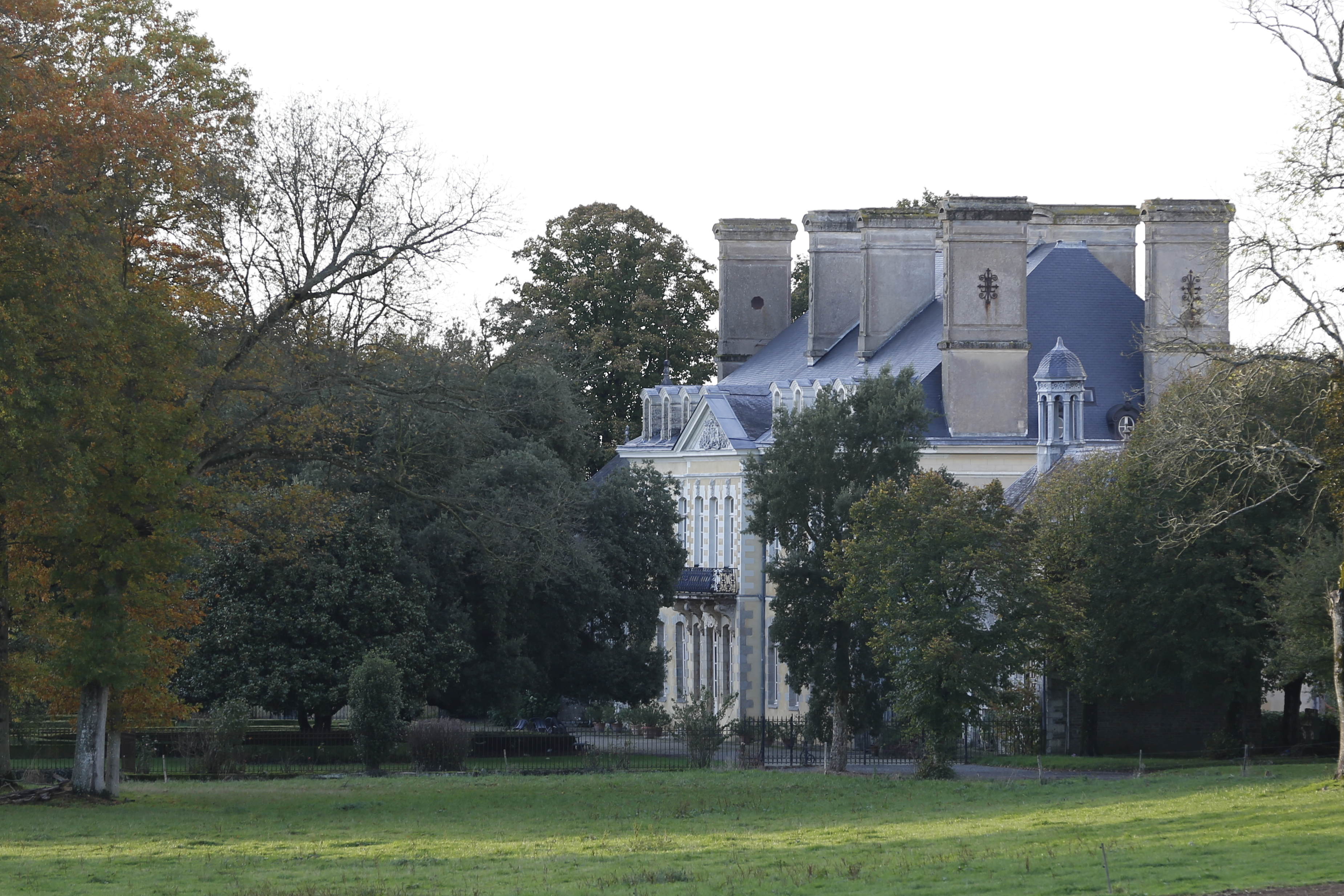 Le château du Plessix à La Couyère.